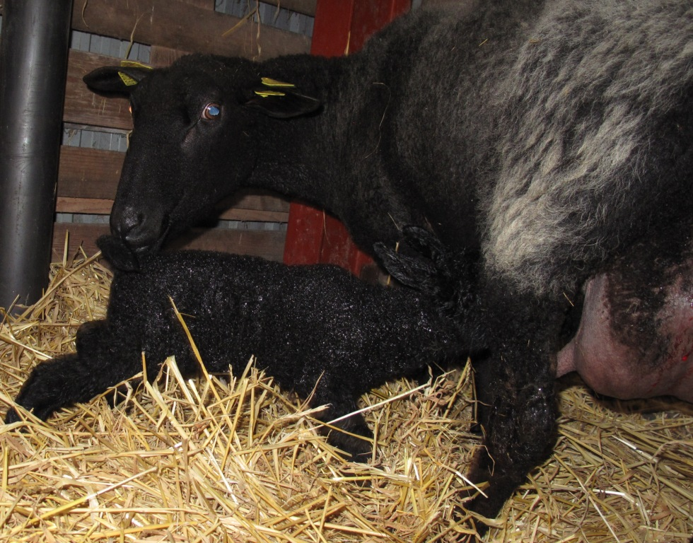 Ældre moderfår med nyfødt lam